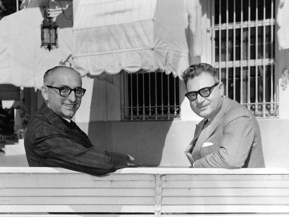 El presidente Arturo Frondizi con el secretario Rogelio Frigerio en la Quita de Olivos, 1958.